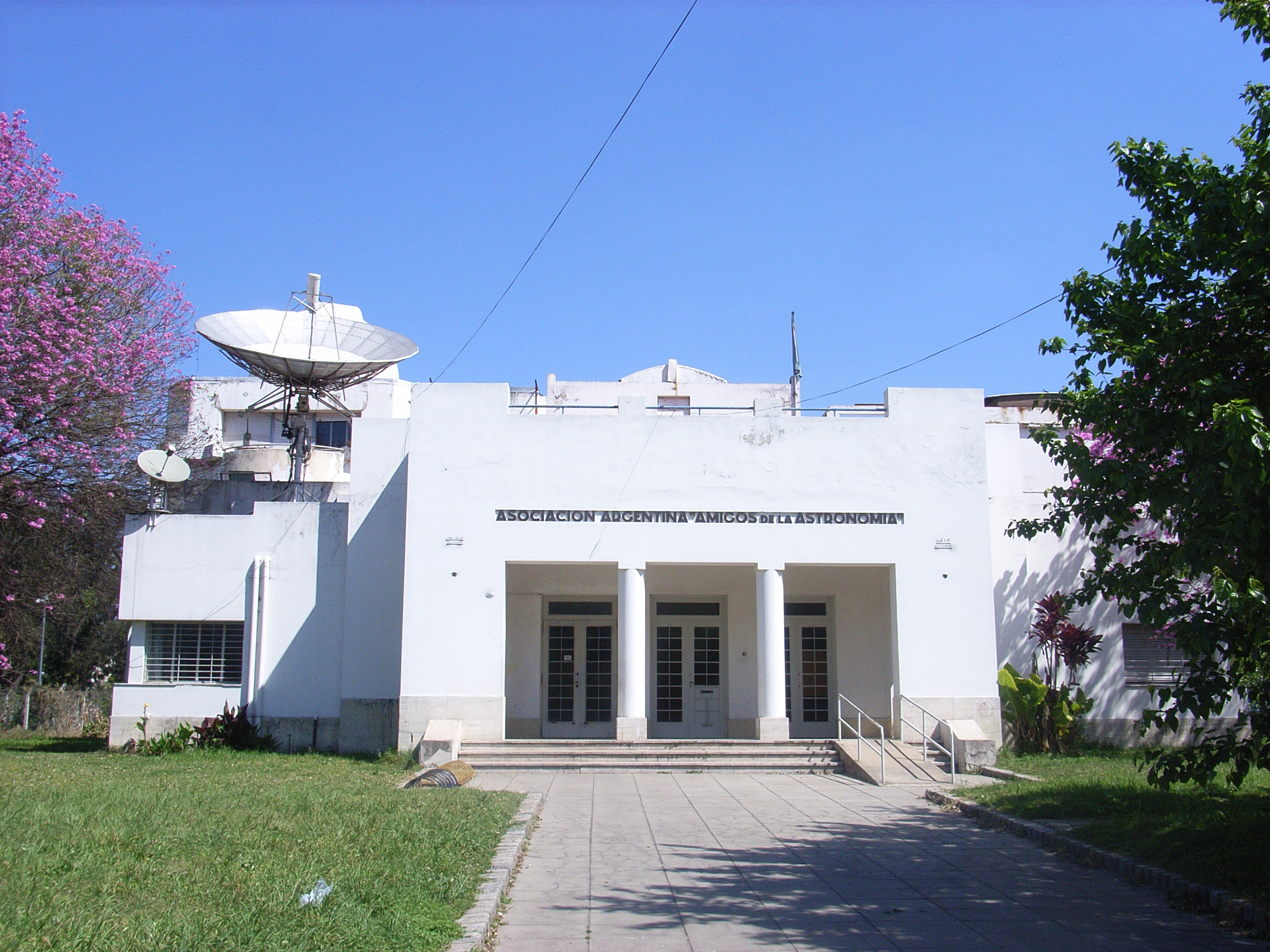 Sede de la Asociación Argentina "Amigos de la Astronomía", En Buenos Aires.